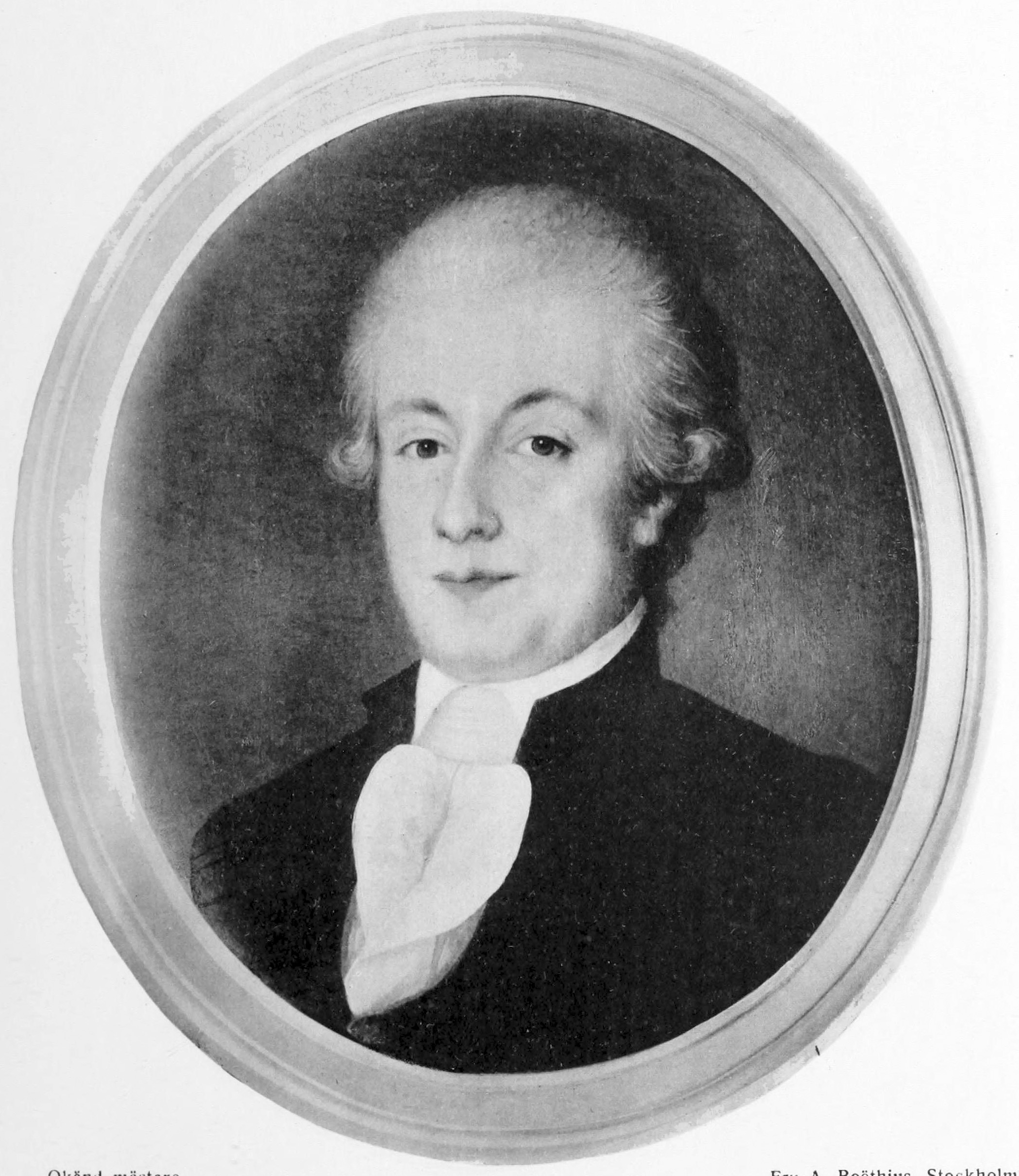 Johan Fredrik Sacklén (1763-1851). Medelålders man, bröstbild, fas t. h., med mörkt gråblå ögon, gulbruna ögonbryn, hvit uppstruken piskperuk med kanonlock vid örat. Hvit nedvikt krage, hvit b’ndad halsduk, stärkt utstående krås. Uniform, svenska dräkten: blå rock med uppstående krage och axelpuffar, ljusare blå passpoaler under kragen, längs knapp- och knapphålsraden och på axelpuffarna, platta fasonerade förgyllda knappar, oknäppta upptill. Grå bakgrund. Olja på oval duk, 47x3472 ctm., af okänd mästare från 1790-talet. Tillhör fru A. Boethius, Stockholm.